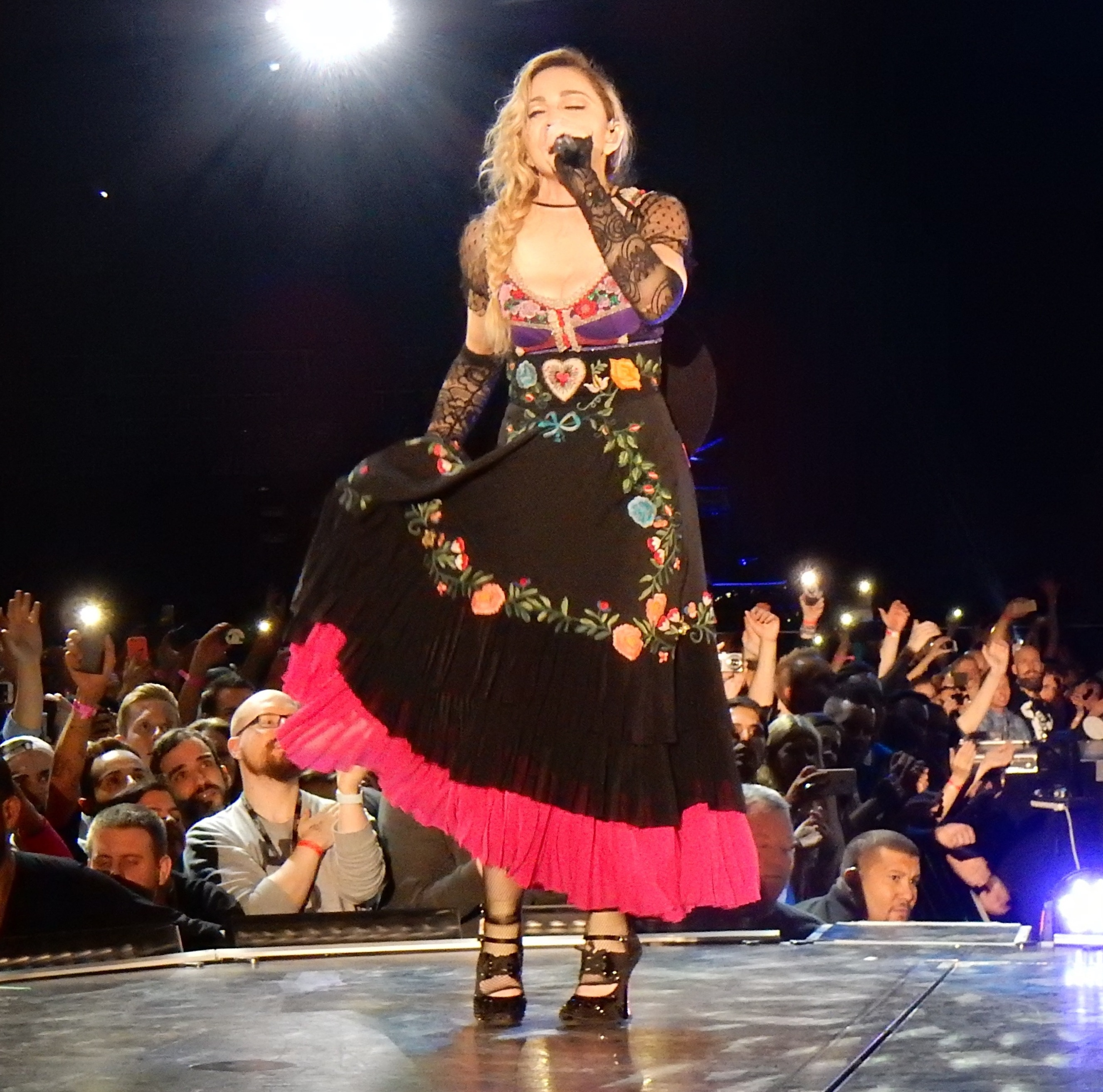 Madonna Rebel Heart Tour 2015 - Stockholm